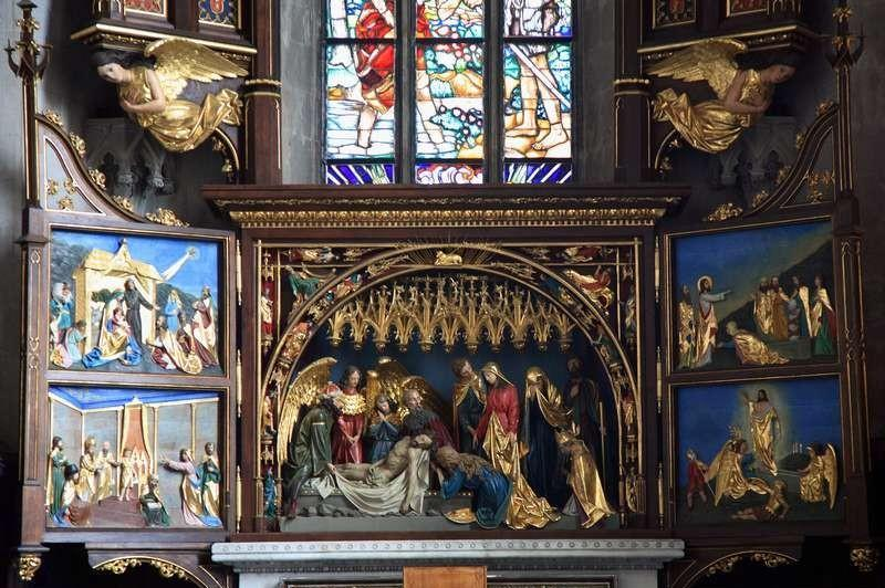 Katedra w Przemyślu